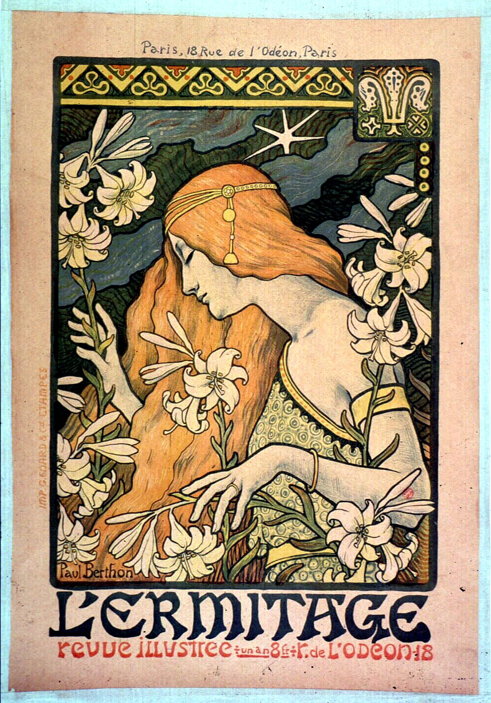 L'Ermitage, revue illustrée